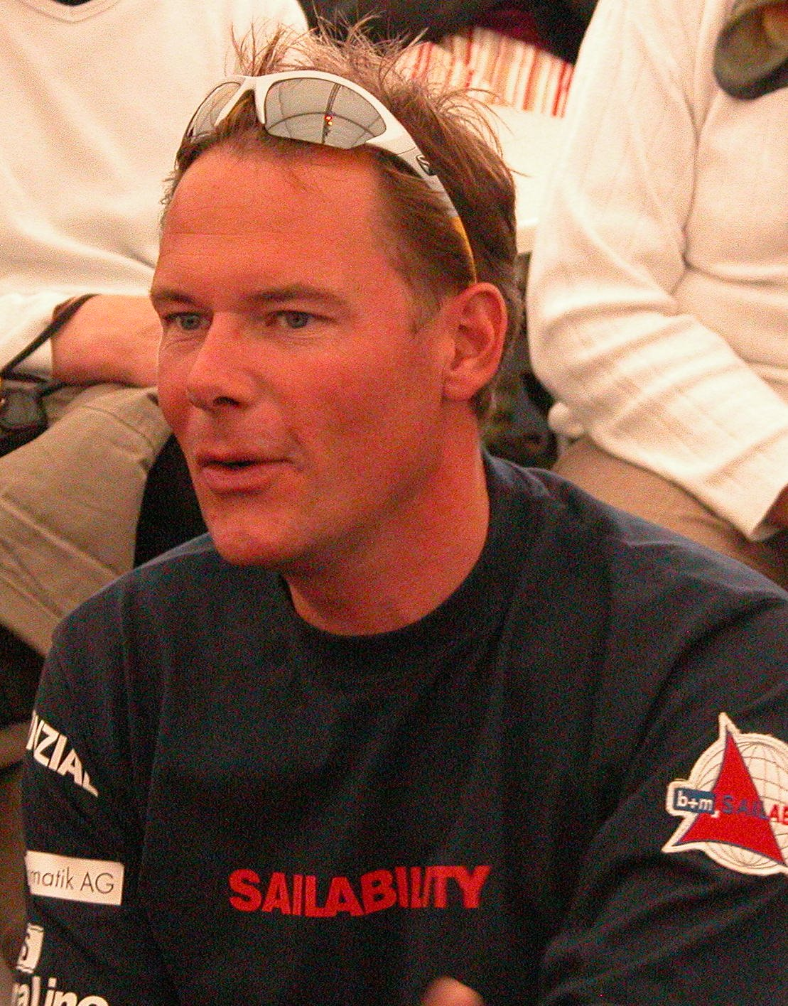 Heiko Kröger